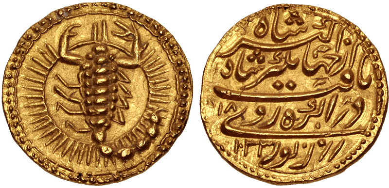 سکه نورالدین محمد جهانگیر؛ خورشید در برج عقرب